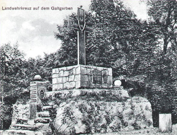 Gipfelkreuz auf dem Galtgarben